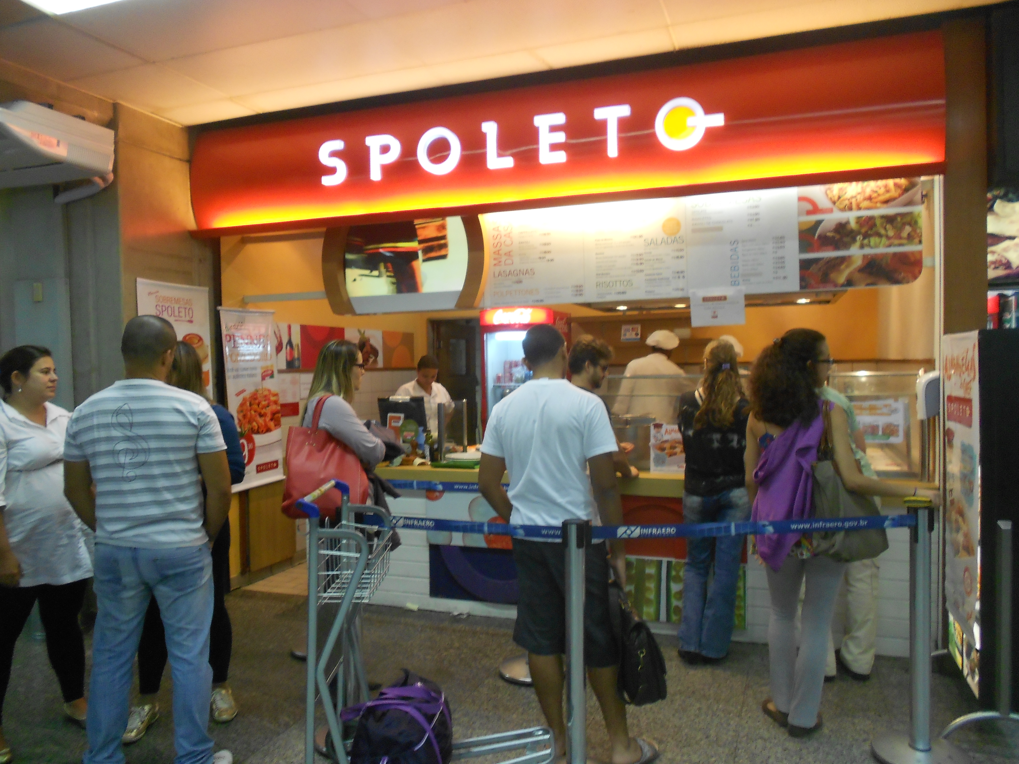 Spoleto, situado no Aeroporto Tom Jobim, no Galeão, Ilha do Governador, Rio de Janeiro, Brasil.